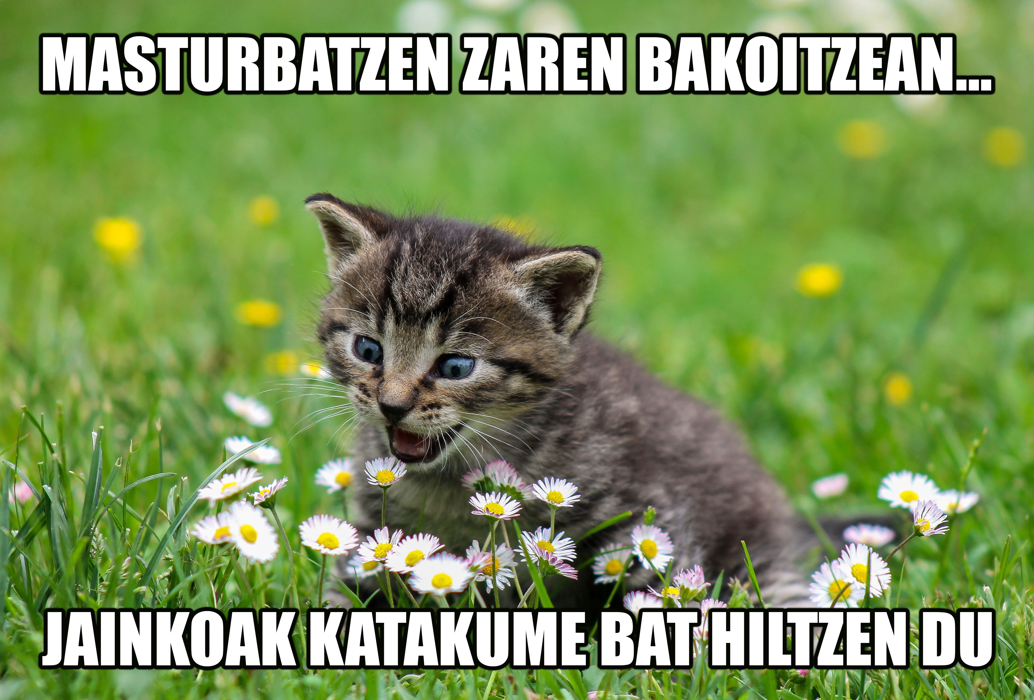 Memearen bertsio librea Jatorrizko irudia: File:A kitten on the lawn (Pixabay).jpg